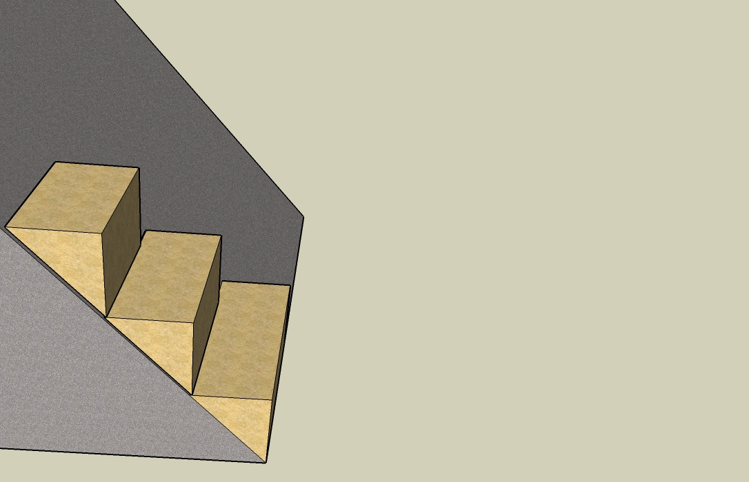 מדרגות גושניות